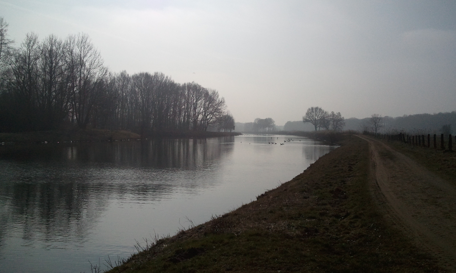 Das Dorf Siebeneichen liegt am Elbe-Lübeck Kanal.